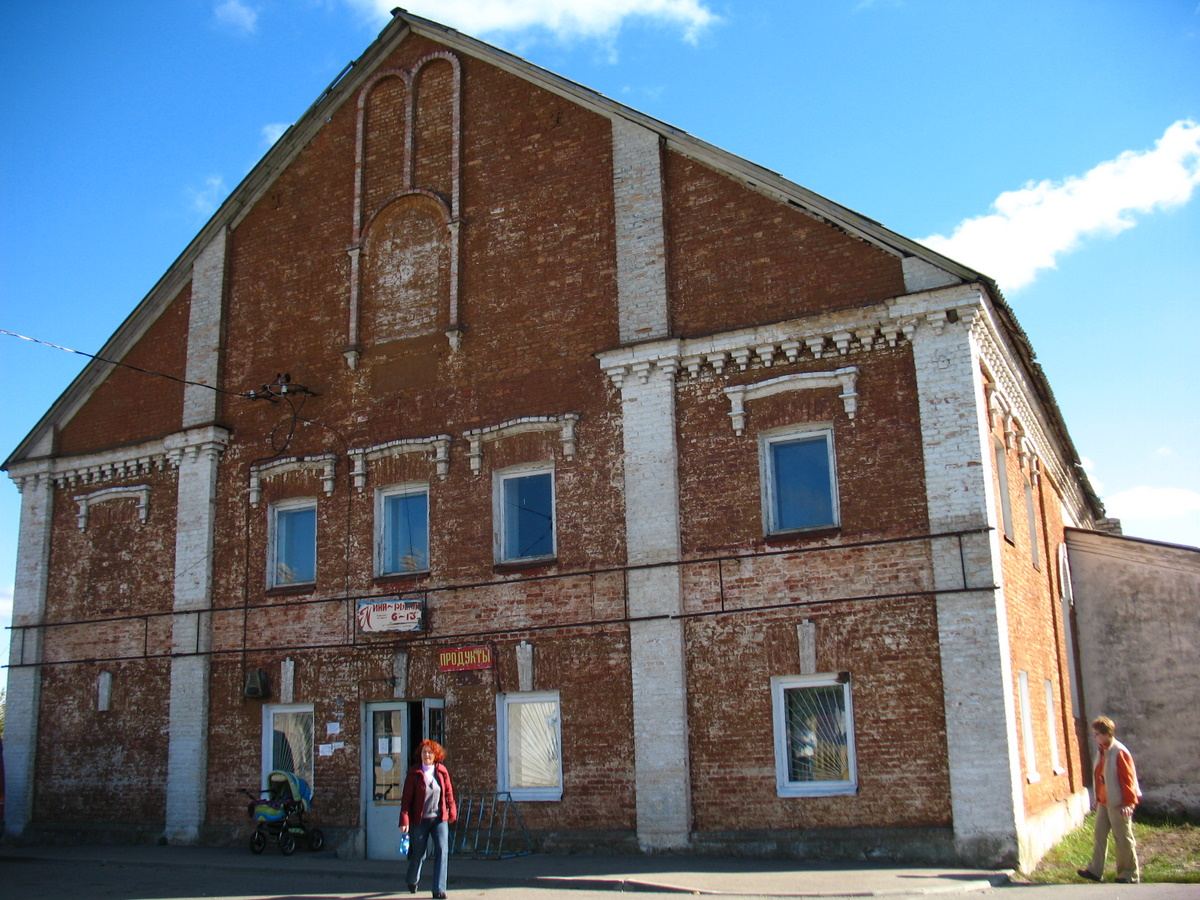 Беларуская (тарашкевіца): Новы Двор